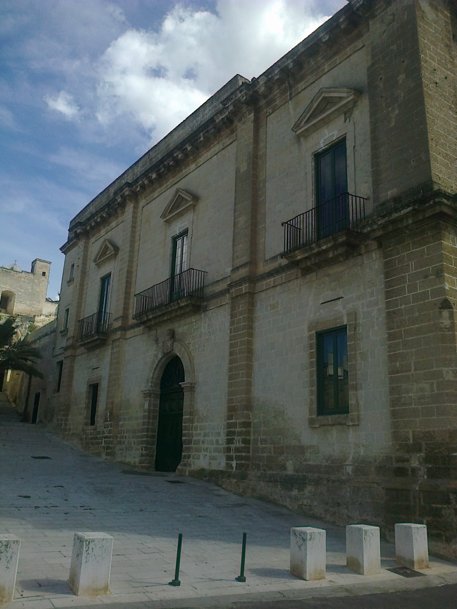 Facciata di un palazzo antico a Massafra